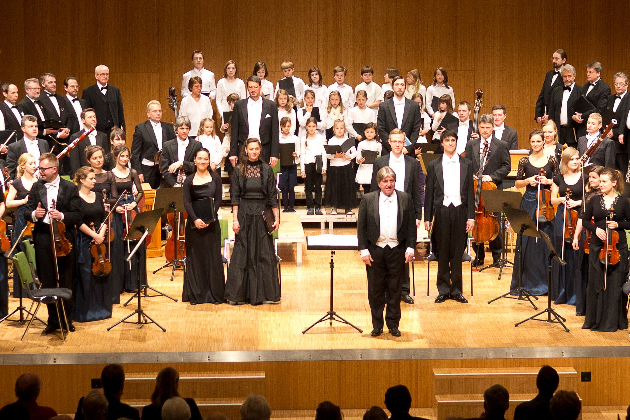 Aufführung der Matthäuspassion im Darmstädter Darmstadtium an Karfreitag 2014